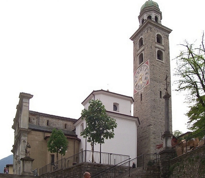 Lugano - Cattedrale